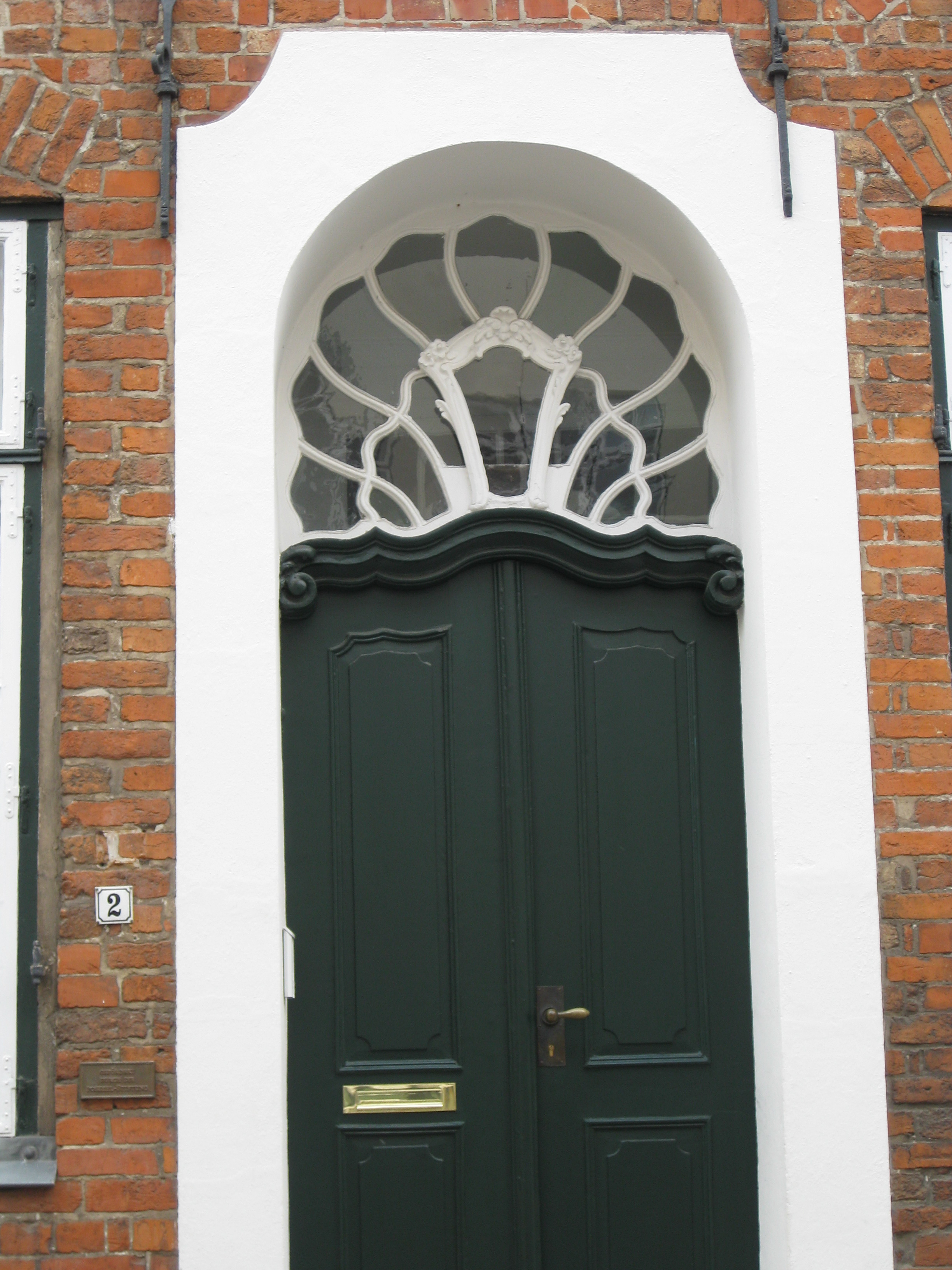 Barockportal des Predigerhauses Königstraße 2 in Lübeck